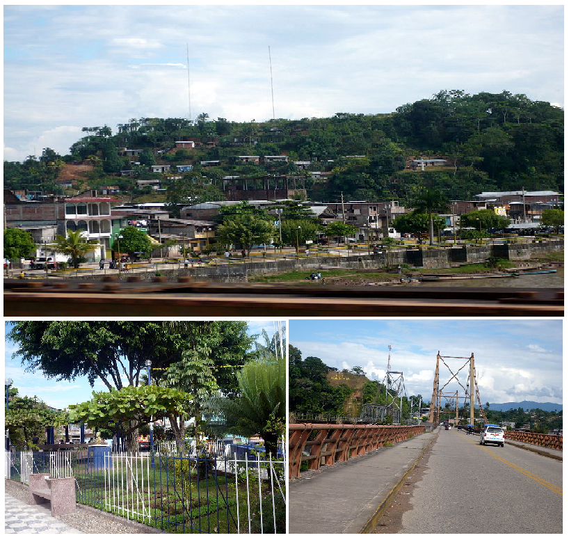 Collage de Aguaytía